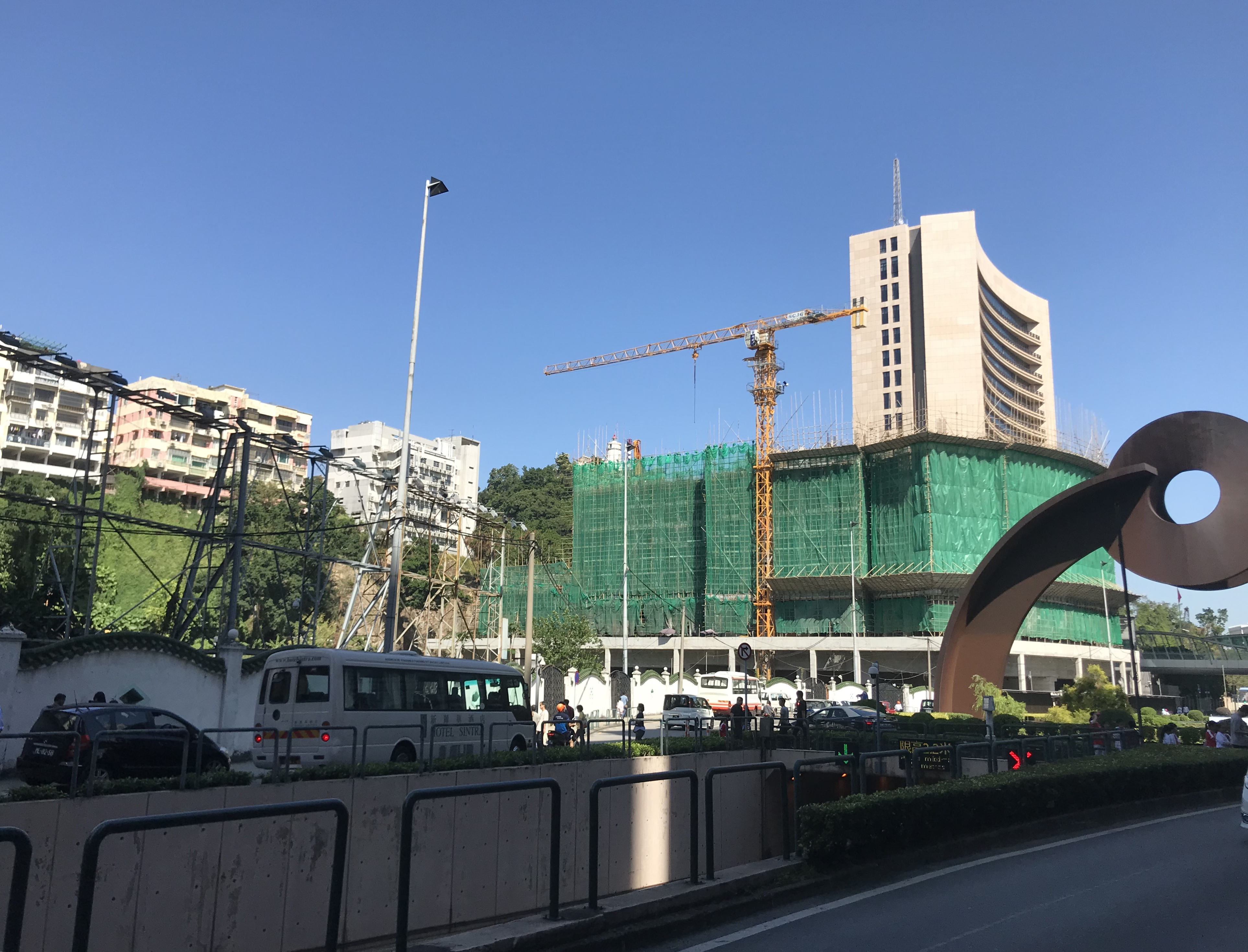 松山南部羅理基博士大馬路望向松山燈塔的景觀被135地段的工程破壞。